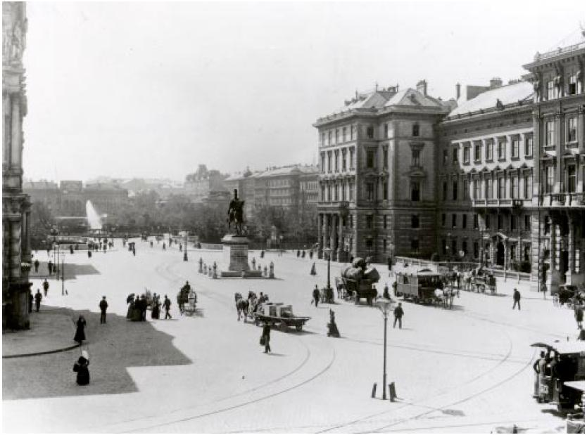 Der Schwarzenbergplatz im Jahre 1902; im Bildmittelgrund rechts das Palais Ofenheim